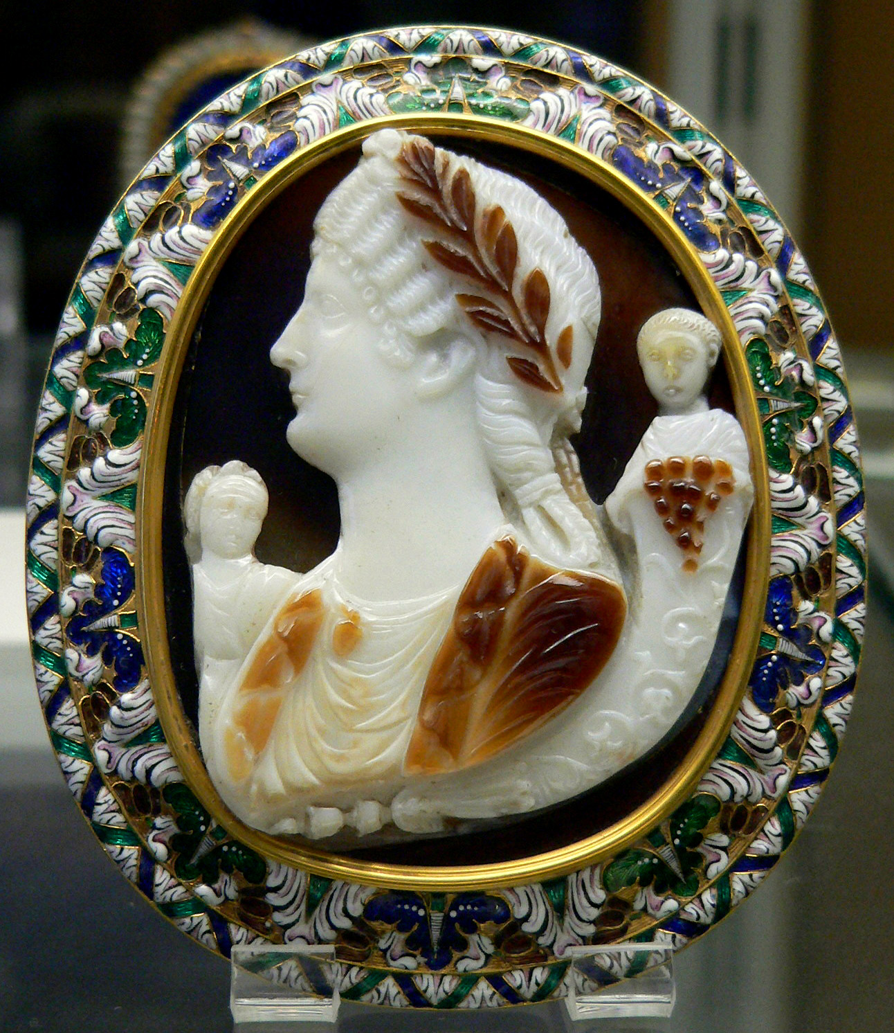 Camée, Messaline et ses enfants Camée représentant le buste de Messaline et de ses enfants, Octavie et Britannicus. Sardonyx, or, émail(monture en or émaillé du XVIIe siècle)